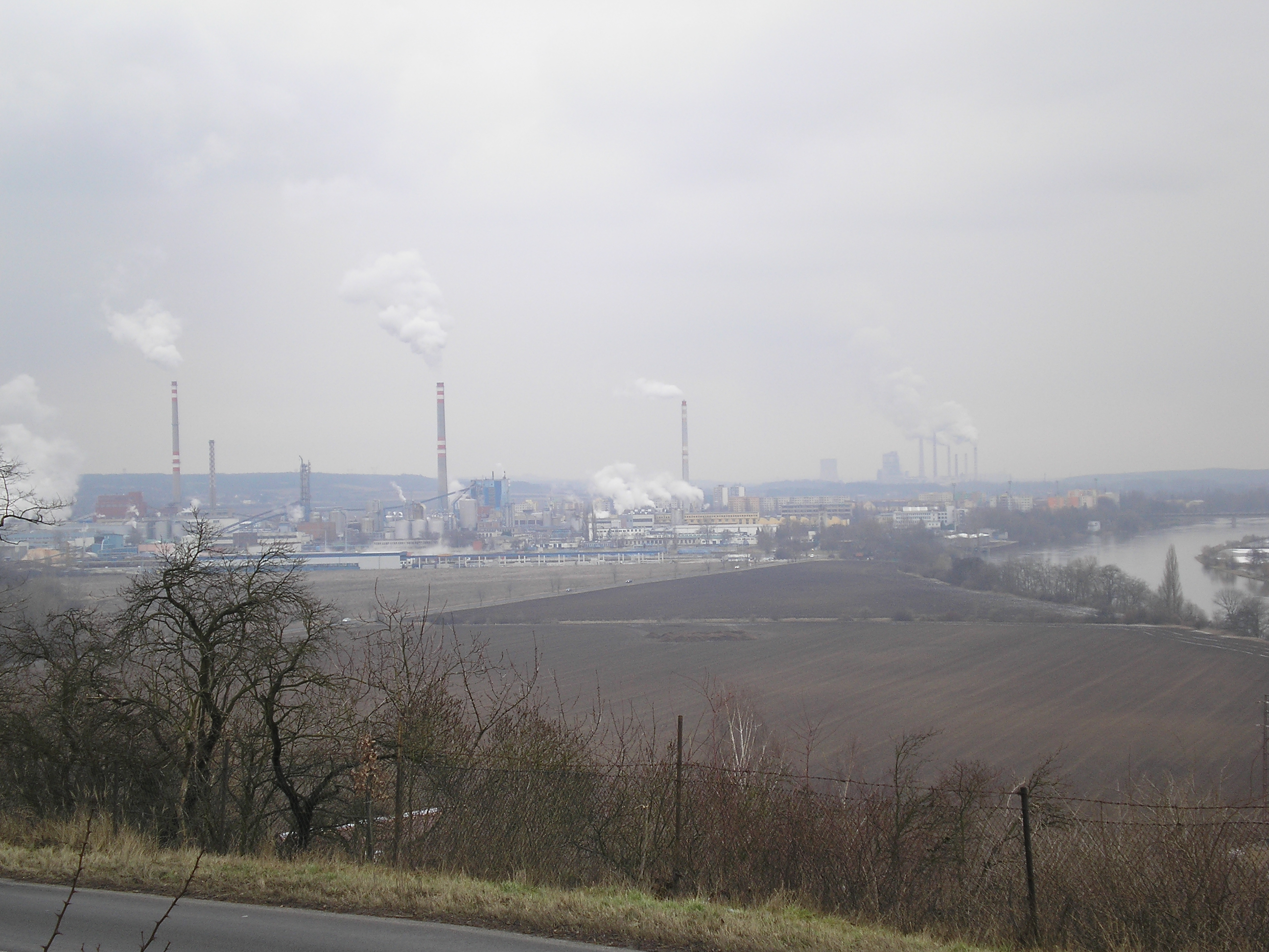 Pohled na Štětí z Hošteckého vrchu (v pozadí Elektrárna Mělník)